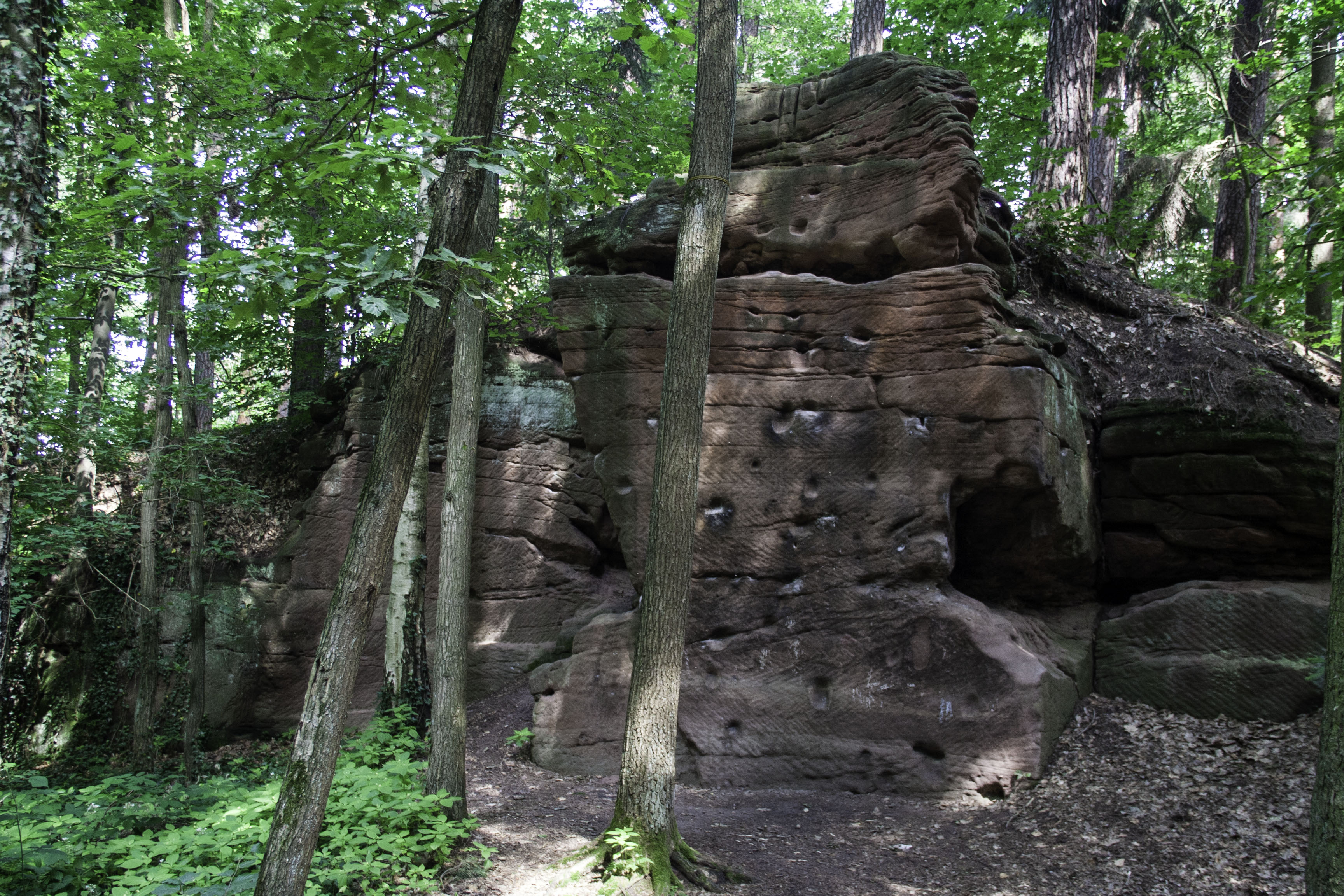 Schmausenbuck, Steinbruch